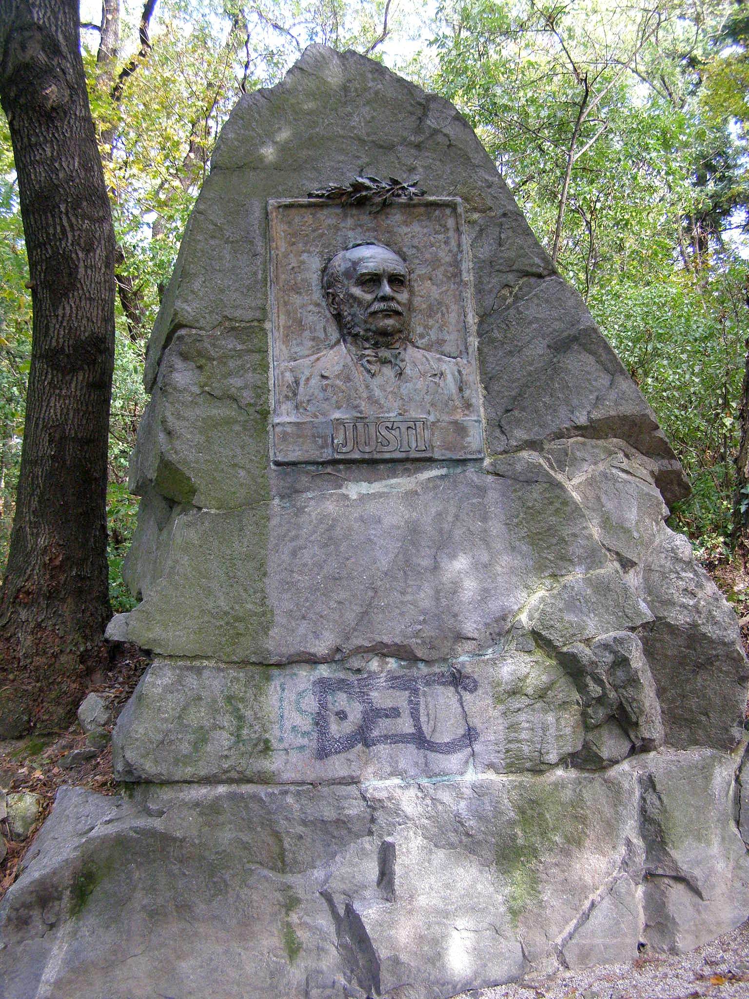 Pamätník mešťanostu Heinricha Justiho (1804 - 1878) v Horskom parku. H. Justi bol spoluzakladateľom parku